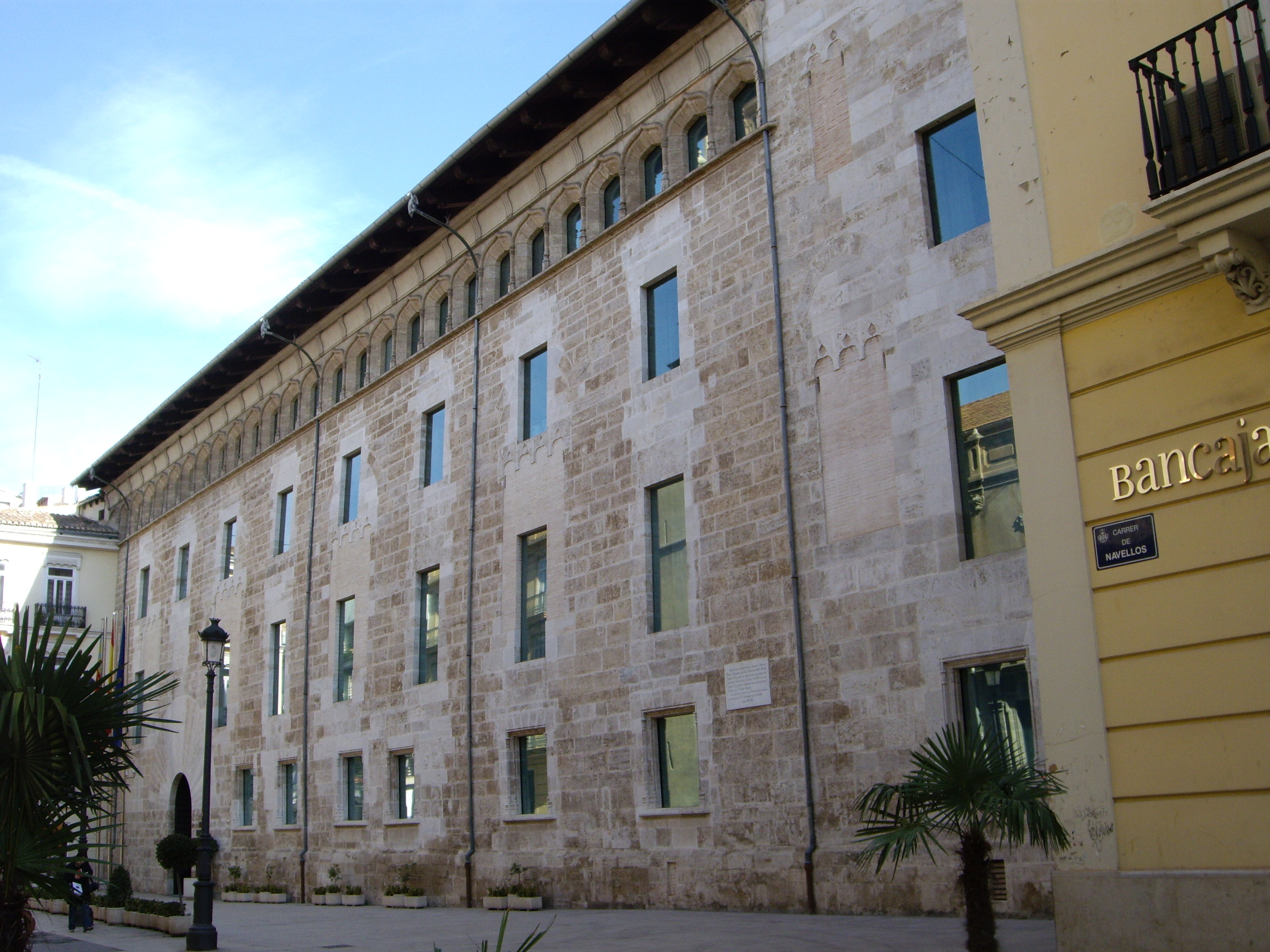 Palau de Benicarló, dels Borja o de les Corts, València.